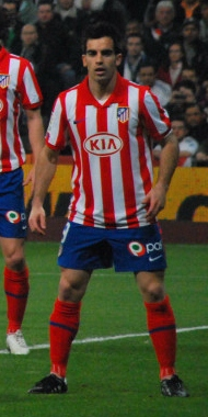 Real Madrid 3 - Atletico de Madrid 2